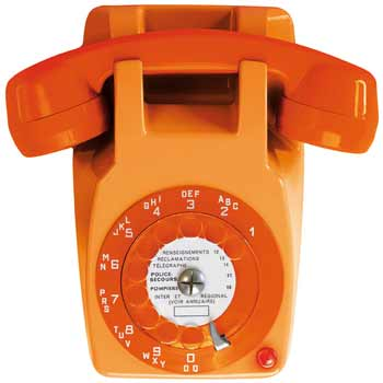 Téléphone à cadran rotatif alpha-numérique. Avant octobre 1963, les indicatifs téléphoniques de Paris et de sa banlieue correspondaient aux trois premiers chiffres du central de rattachement.